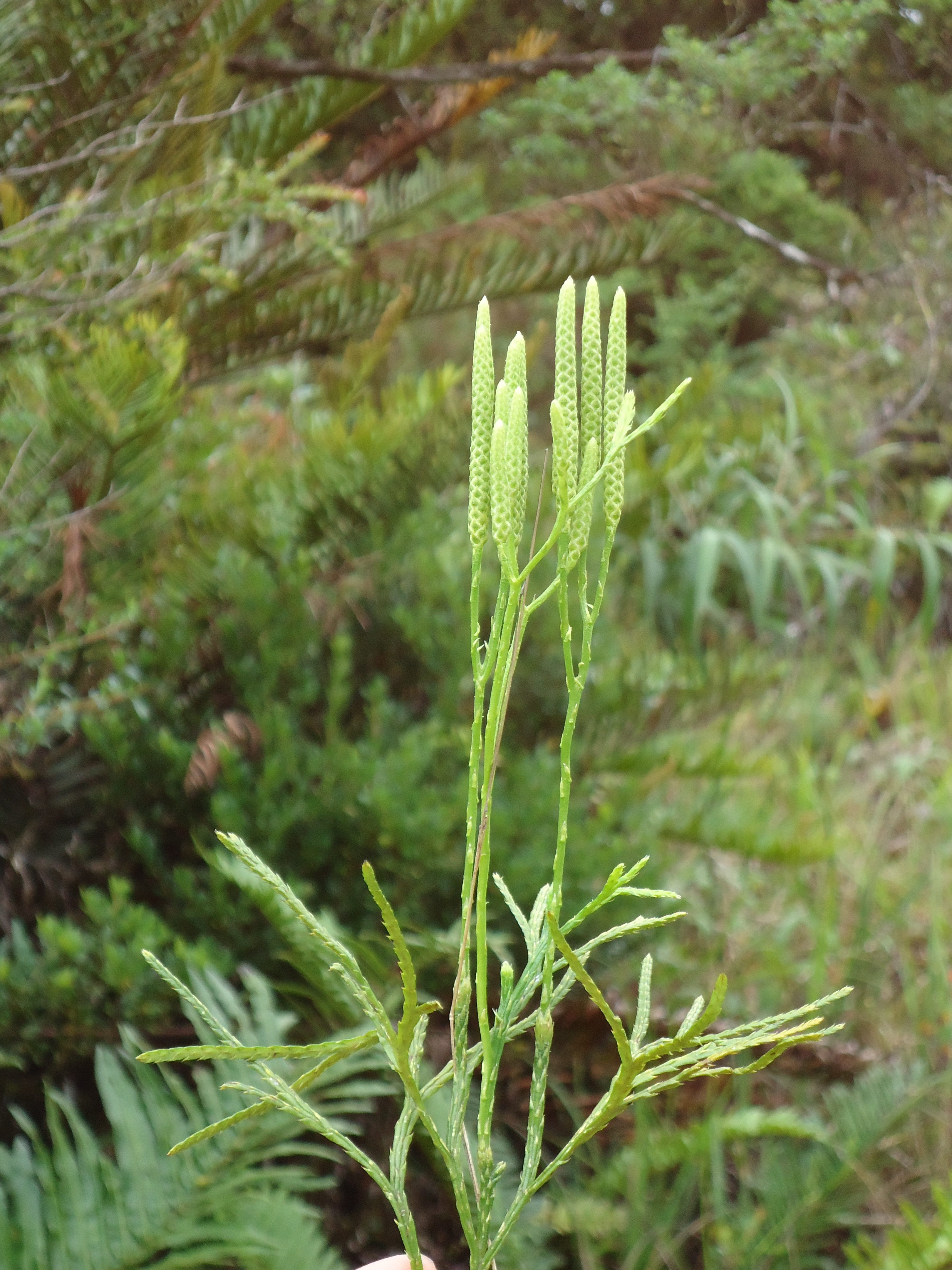 Diphasium (cf. jussiaei). Uno de las especies más antiguas que se pueden encontrar en los páramos. Costa Rica